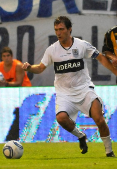 Guillermo Barros Schelotto, ante Olimpo de Bahía Blanca, en el partido del Torneo Clausura 2011 que marcó su regreso como futbolista de Gimnasia La Plata tras 14 años.